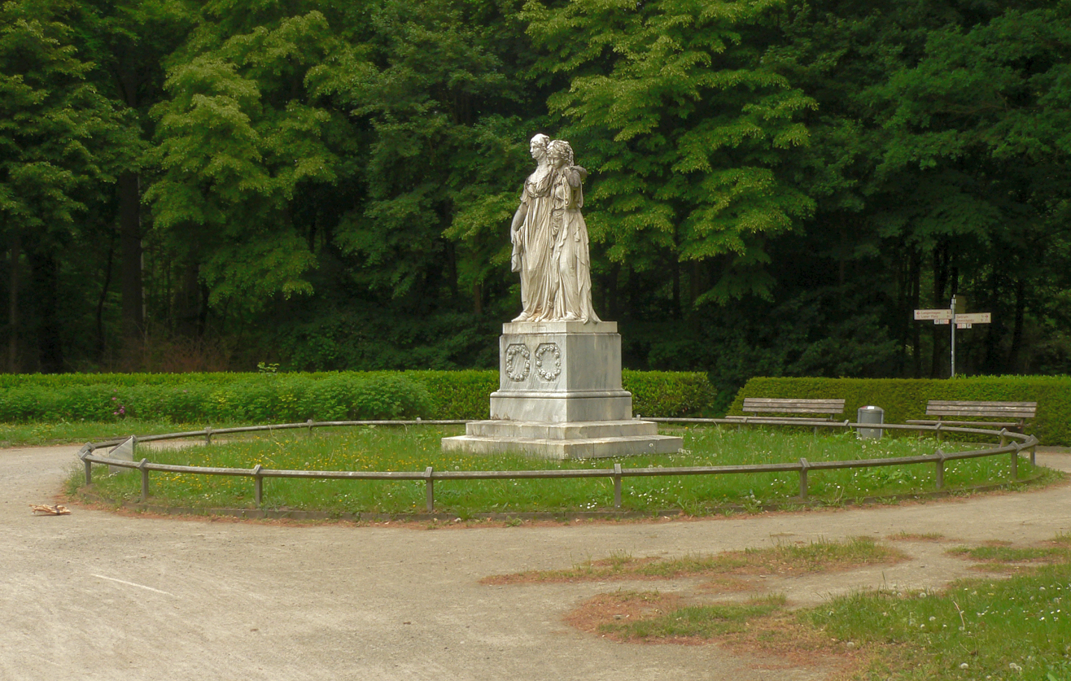 Königinnendenkmal